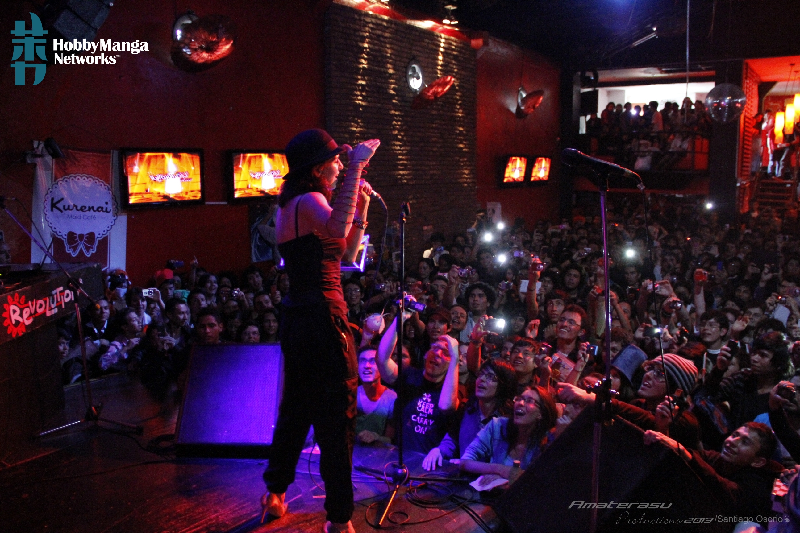 Tokyo Impact! 2013 foto